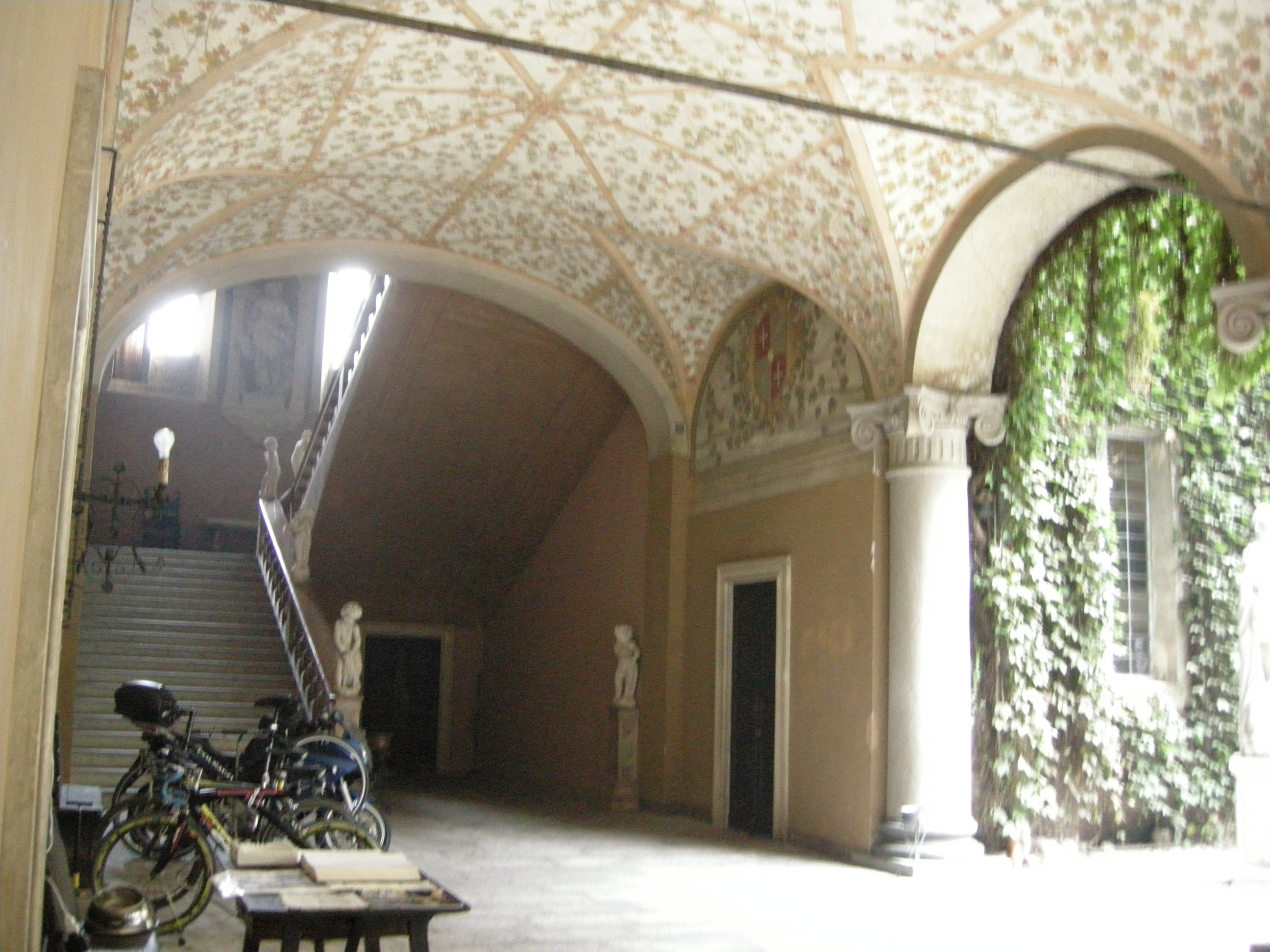 Soragna, rocca 04.1